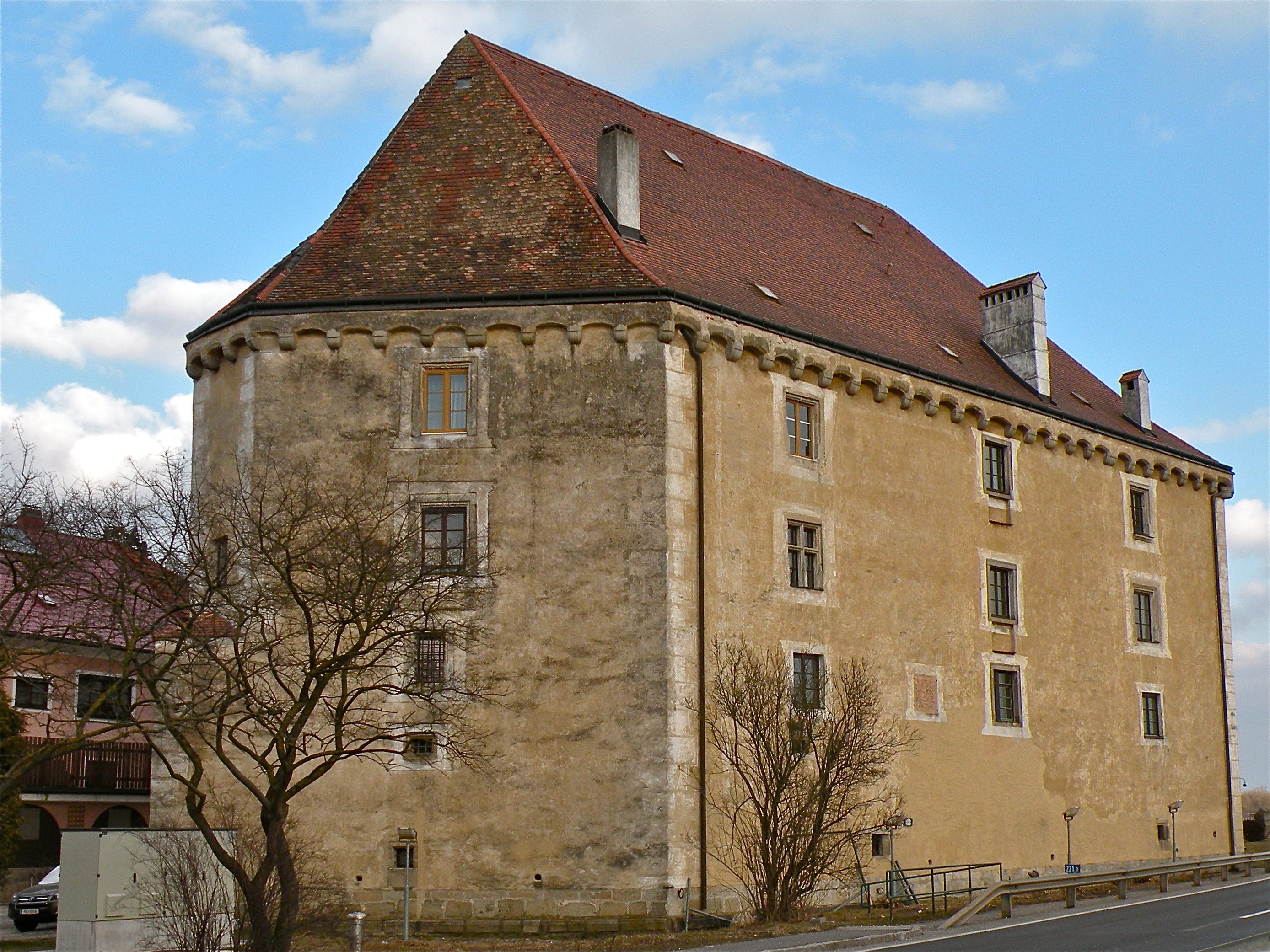 Südwestansicht von Schloss Pragstein in Mauthausen im Bezirk Perg in Oberösterreich